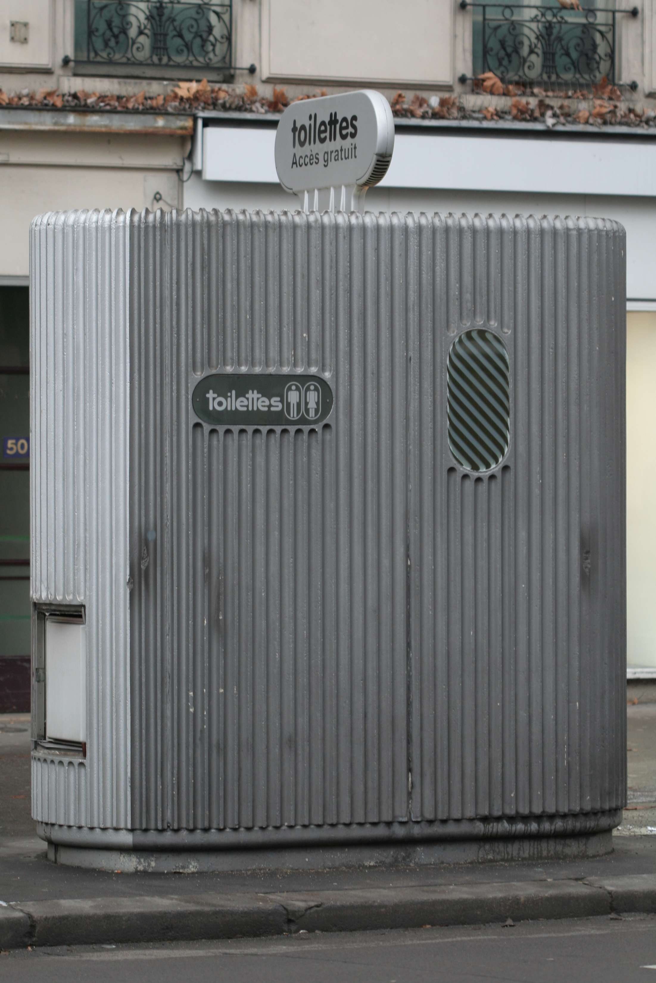 sanisette, avenue du Général-Leclerc, 14e arrdt